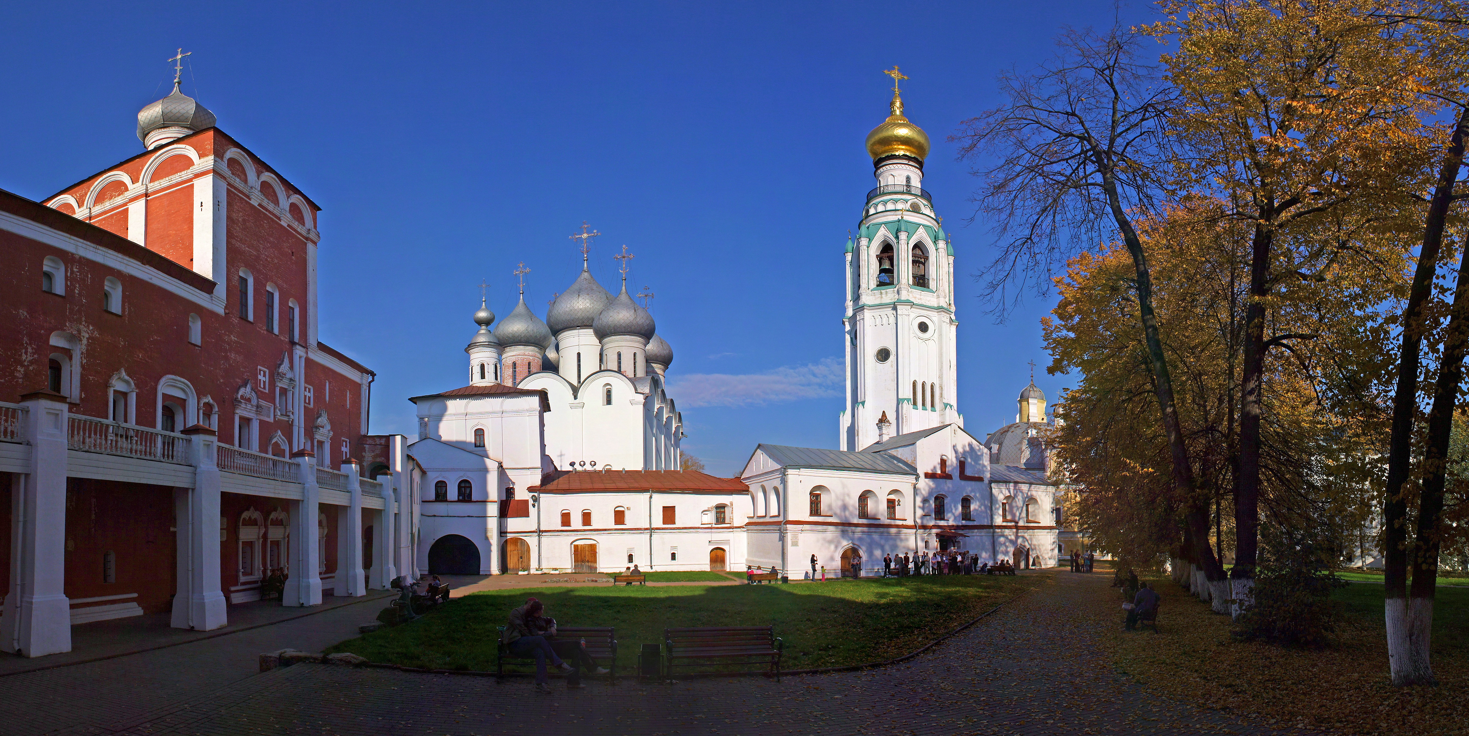 Ансамбль Вологодского кремля. Во дворе